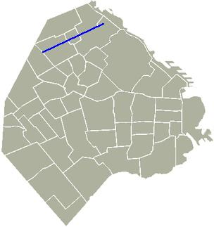 Mapa de la Avenida Congreso - Ciudad de Buenos Aires - Argentina